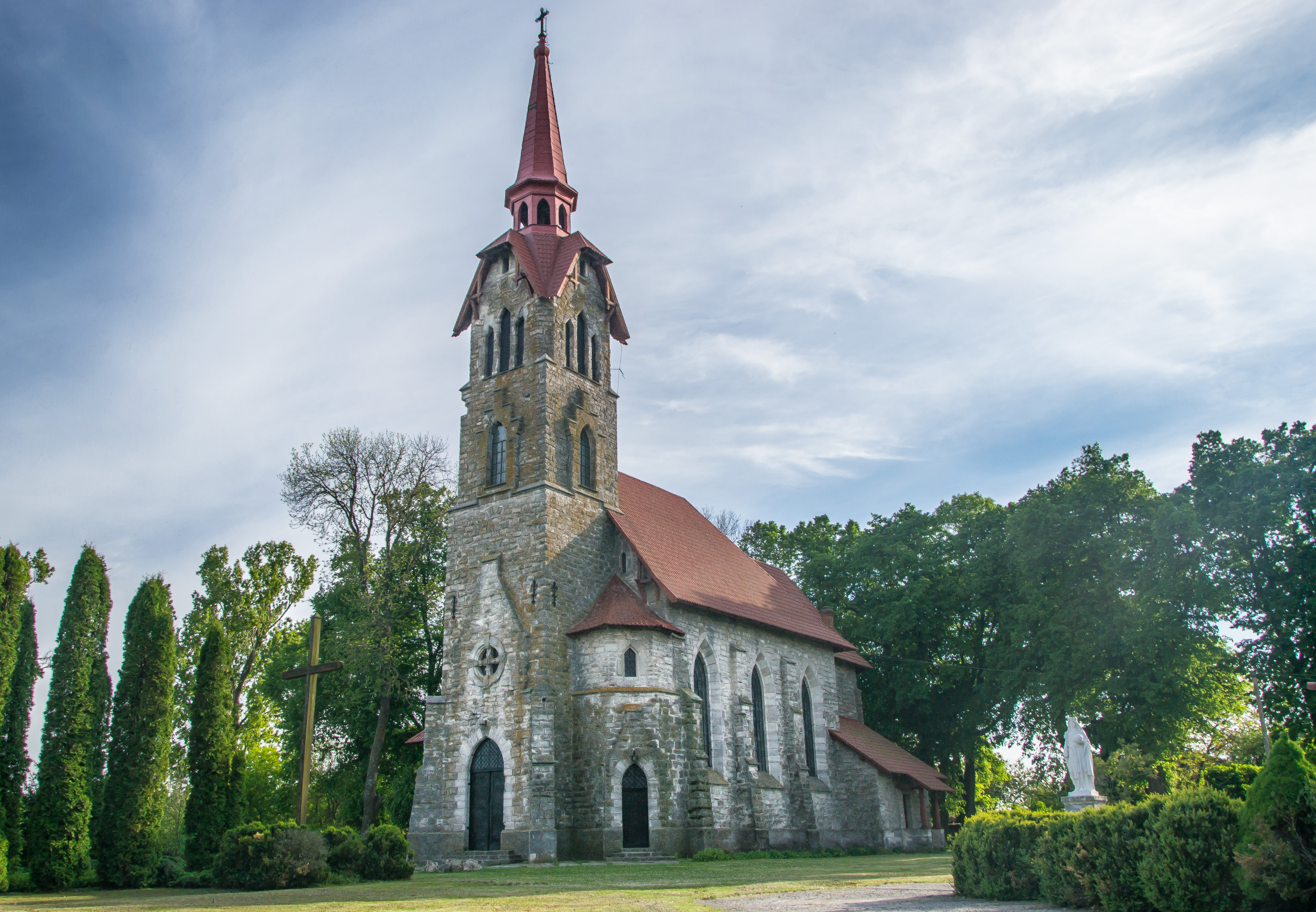 Костел(мур.), Лосяч